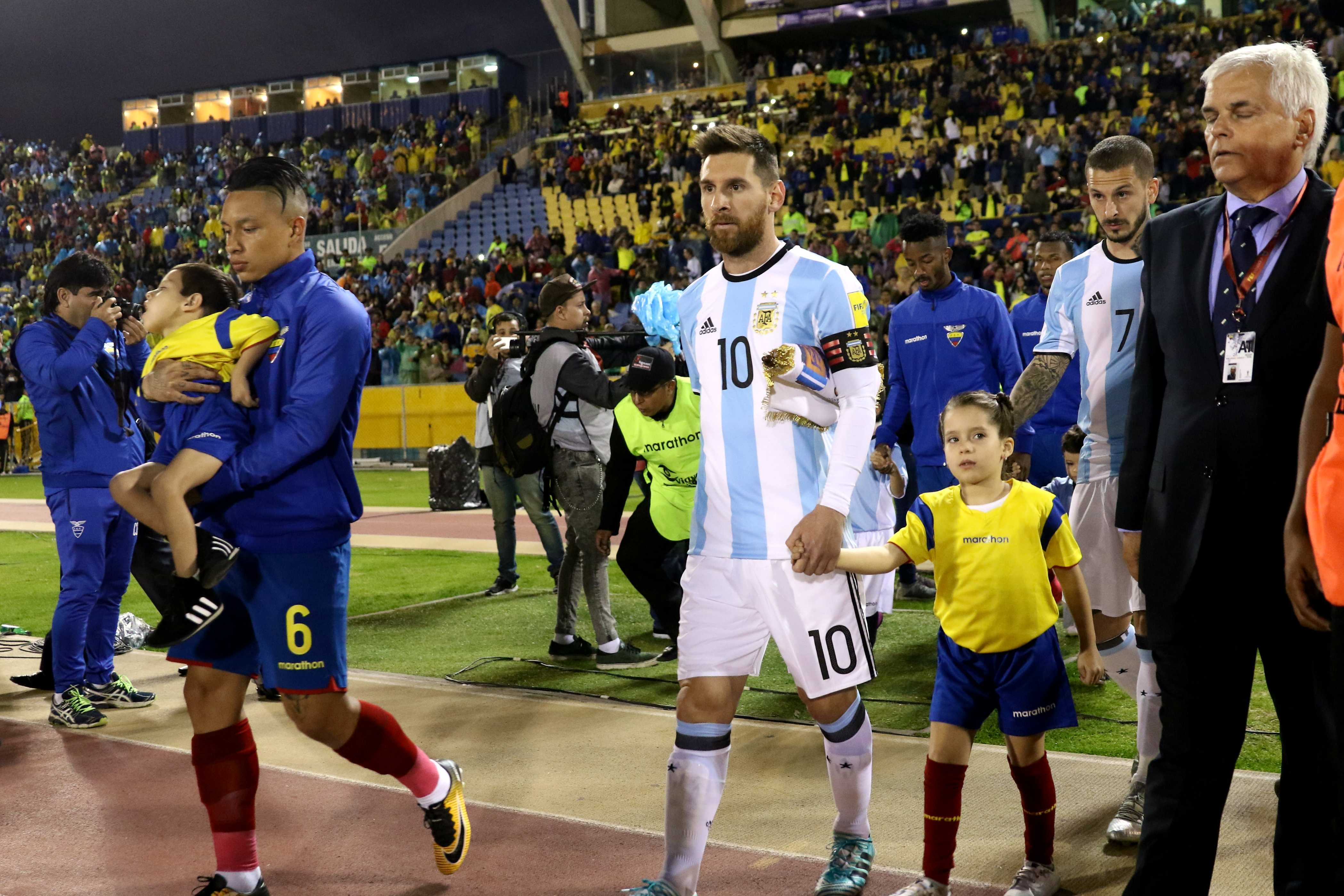 Quito, 10 oct (Andes).- Con tres tantos Argentina espantó los fantasmas de la eliminación, clasificó a su décima octava Copa del Mundo y venció 3-1 a un Ecuador que inició ganando el compromiso, disputado en el estadio Atahualpa de Quito, pero que no supo contener a uno de los mejores jugadores del mundo. ANDES/Micaela Ayala V.